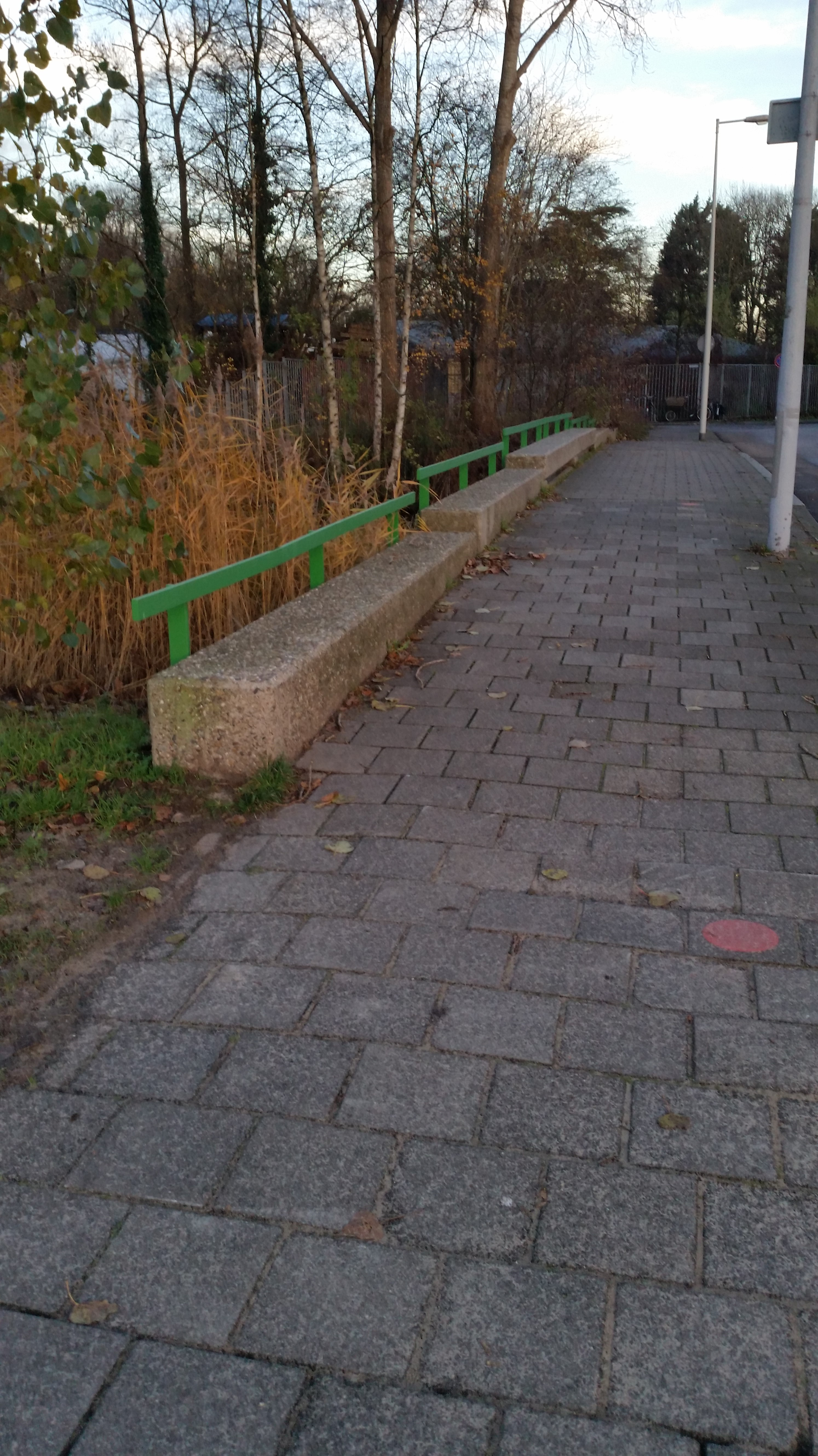 Leuningen van Brug 821 (in Amsterdam)